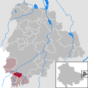 Vollmershain in Thuringia - District Altenburger Land